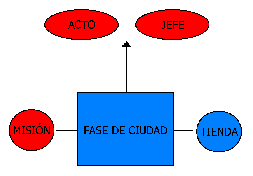 Esquema de juego de Sonic the Hedgehog lanzado para Xbox360 y PS3